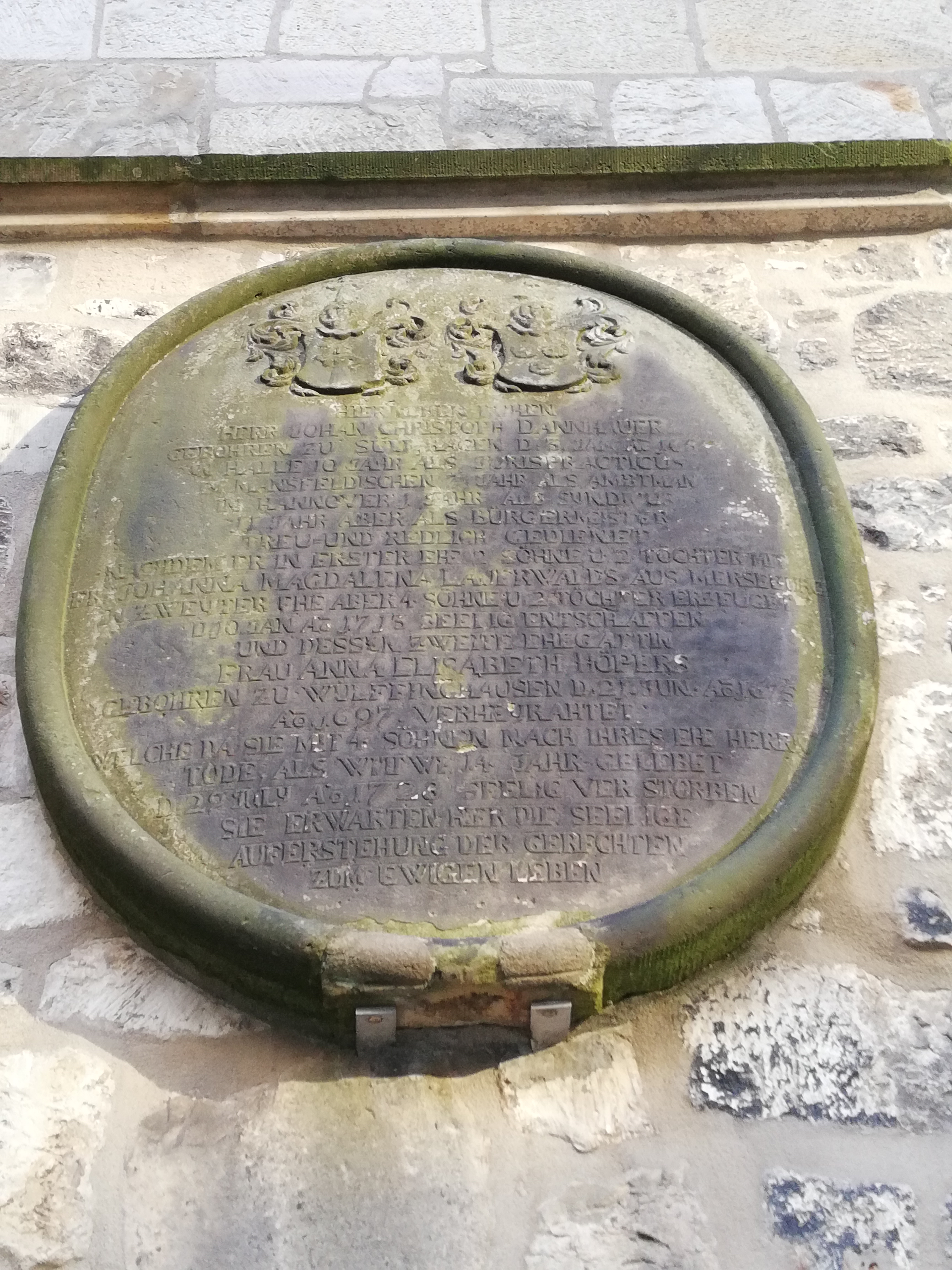 Epitaph an der nördöstlichen Aussenwand nebem dem Chor der Aegidienkirche für die Familie des hannoverschen Bürgermeisters Johann Christoff Dannhauer: „HIERNEBEN RUHEN HERR JOHAN CHRISTOPH DANNHAUER GEBOHREN ZU SÜLF(?) HAGEN D. 3. JAN AO 1654(?) IN HALLE 10 JAHR ALS JURISPRACTICUS MANSFELDISCHEN 7(?) JAHR ALS AMBTMAN IN HANNOVER 1(?) Jahr ALS SYNDICUS 11(?) JAHR ABER ALS BÜRGERMEISTER TREU- UND REDLICH GEDIENET. NACHDEM ER IN ERSTER EHE 2(?) SÖHNE U. 2 TÖCHTER MIT FR. JOHANNA MAGDALENA LAUERWALDS AUS MERSEBURG D. 10. JAN. AO 1715 SEELIG ENTSCHLAFFEN UND DESSEN ZWEITE EHEGATTIN FRAU ANNA ELISABETH HÖPERS GEBOHREN ZU WÜLFFINGHAUSEN D. 21. JUN. AO 1675 WELCHE DA SIE MIT 4 SÖHNEN NACH IHRES EHE HERRN TODE, ALS WITWE 14 JAHR GELEBET D: 22. JULY AO 1728 SEELIG VER STORBEN SIE ERWARTEN HIER DIE SEELIGE AUFERSTEHUNG DER GERECHTEN ZUM EWIGEN LEBEN“ ...